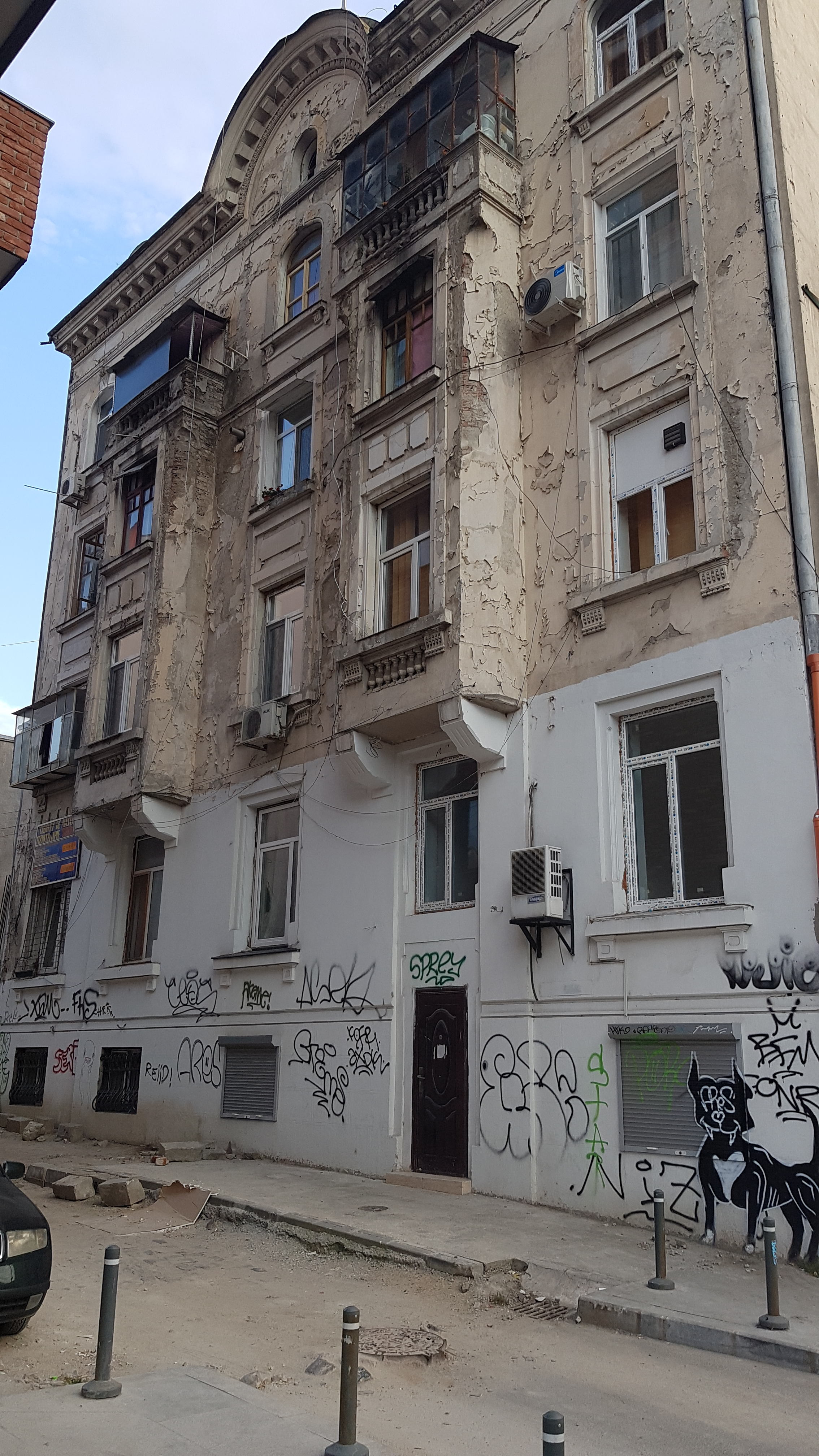 Casă, monument istoric